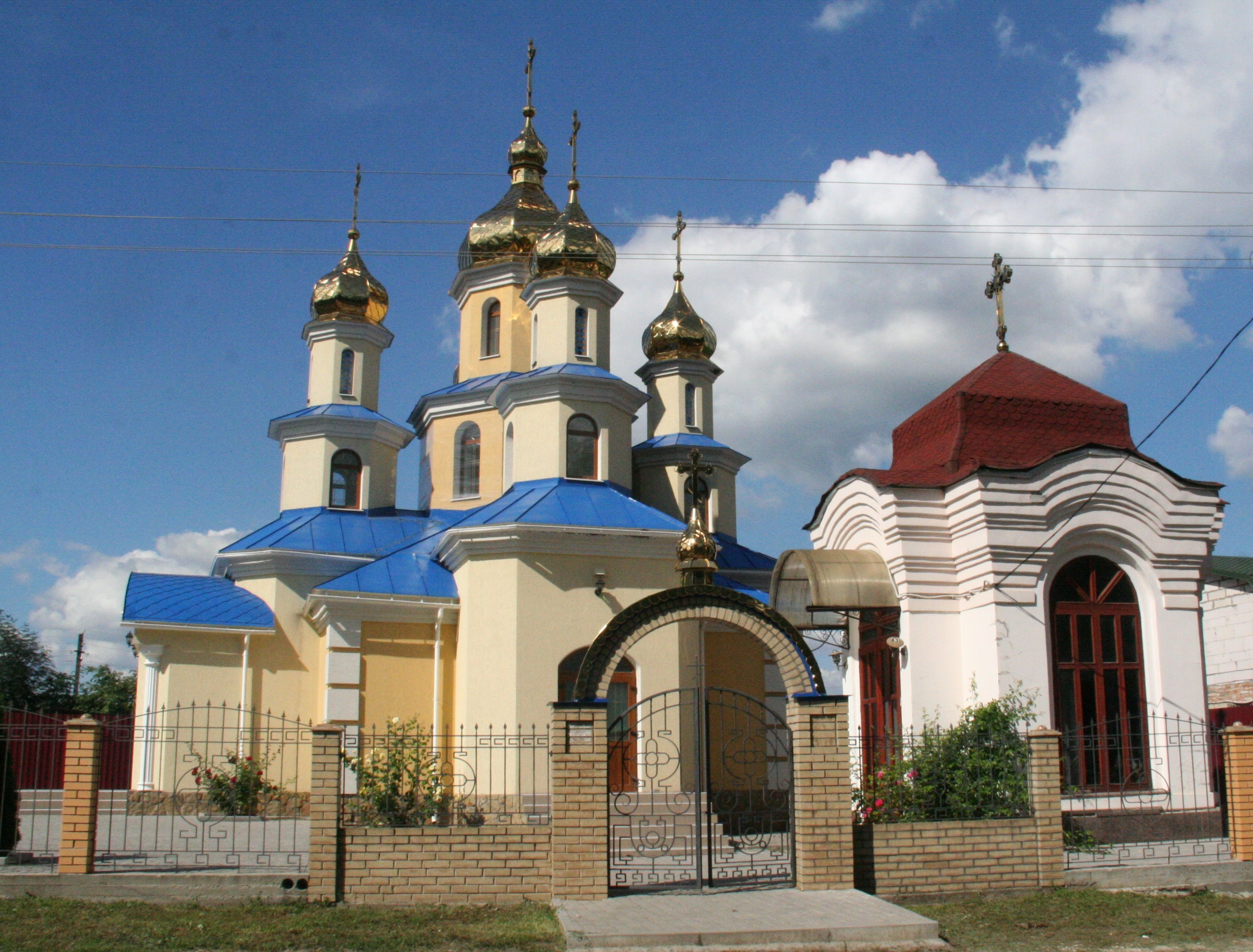 Церква Архистратига Михаїла с.Баламутівка Ярмолинецького району (ПЦУ)